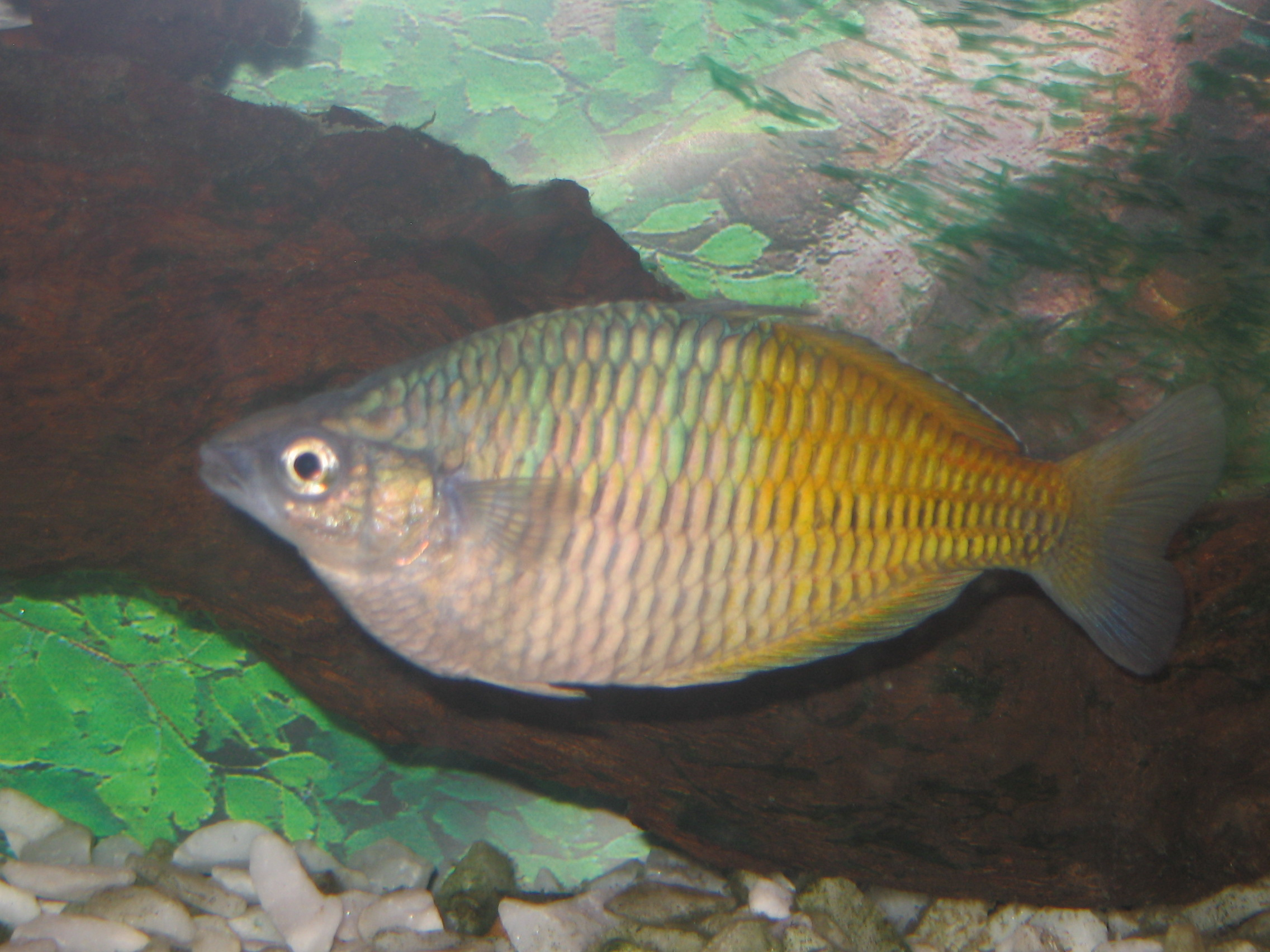 Melanotaenia boesemani